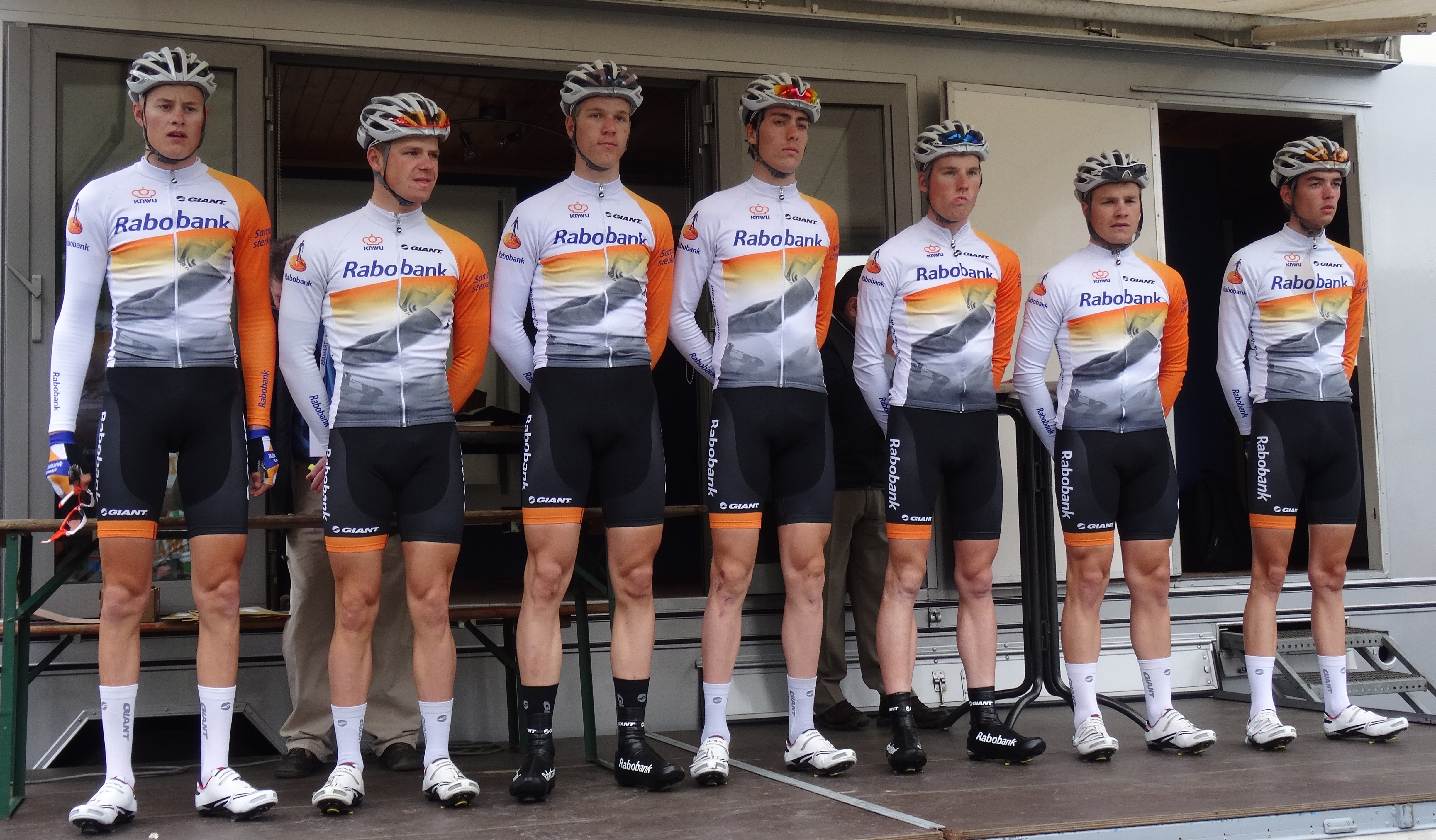 Triptyque des Monts et Châteaux 2014, étape 3, 6 avril 2014, départ de Belœil. Depicted team: Rabobank Development The creation of these files was made possible thanks to the organizers of the Triptyque des Monts et Châteaux 2014 English | français | +/−